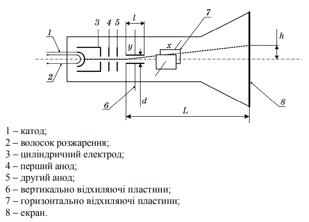 Принцип дії електронно-променевої трубки. Найважливішою деталлю ос- цилографа є електронно-променева трубка (ЕПТ). Вона складається з скляної колби, всередині якої міститься джерело електронів – катод 1, який на- грівається ниткою розжарення 2. Катод знаходиться всередині керуючого (ци- ліндричного) електрода 3. Зміною негативного потенціалу на електроді 3 регу- люється кількість електронів, які проходять через його отвір, що змінює яскра- вість плями на екрані 8 ЕПТ. Перший анод 4 служить для фокусування, а дру- гий 5 для прискорення електронів. Деталі 1…5 складають електронну гармату. Дві пари пластин 6 та 7 служать для відхилення променя: вертикально відхи- ляючі пластини (пластини Y) − у вертикальній площині, горизонтально відхи- ляючі пластини (пластини X) − у горизонтальній площині.